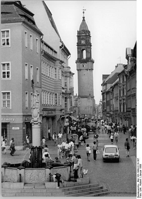 ADN-ZB Link 25.1.1989 Bautzen - eine über 1000jährige Stadt (Serie-5 Motive) Im Jahre 1002 wurde die im Südosten der DDR gelegene Stadt Bautzen erstmals urkundlich erwähnt. Sie liegt an der Spree, zählt heute 53000 Einwohner und gilt als deutsch-sobische Metropole. Die Reichenstraße in der Altstadt (Foto) ist ein beliebter Einkaufs- und Fußgängerboulevard. Der schiefe Reichenturm wurde 1492 erbaut und erhielt 1718 eine Barockhaube.